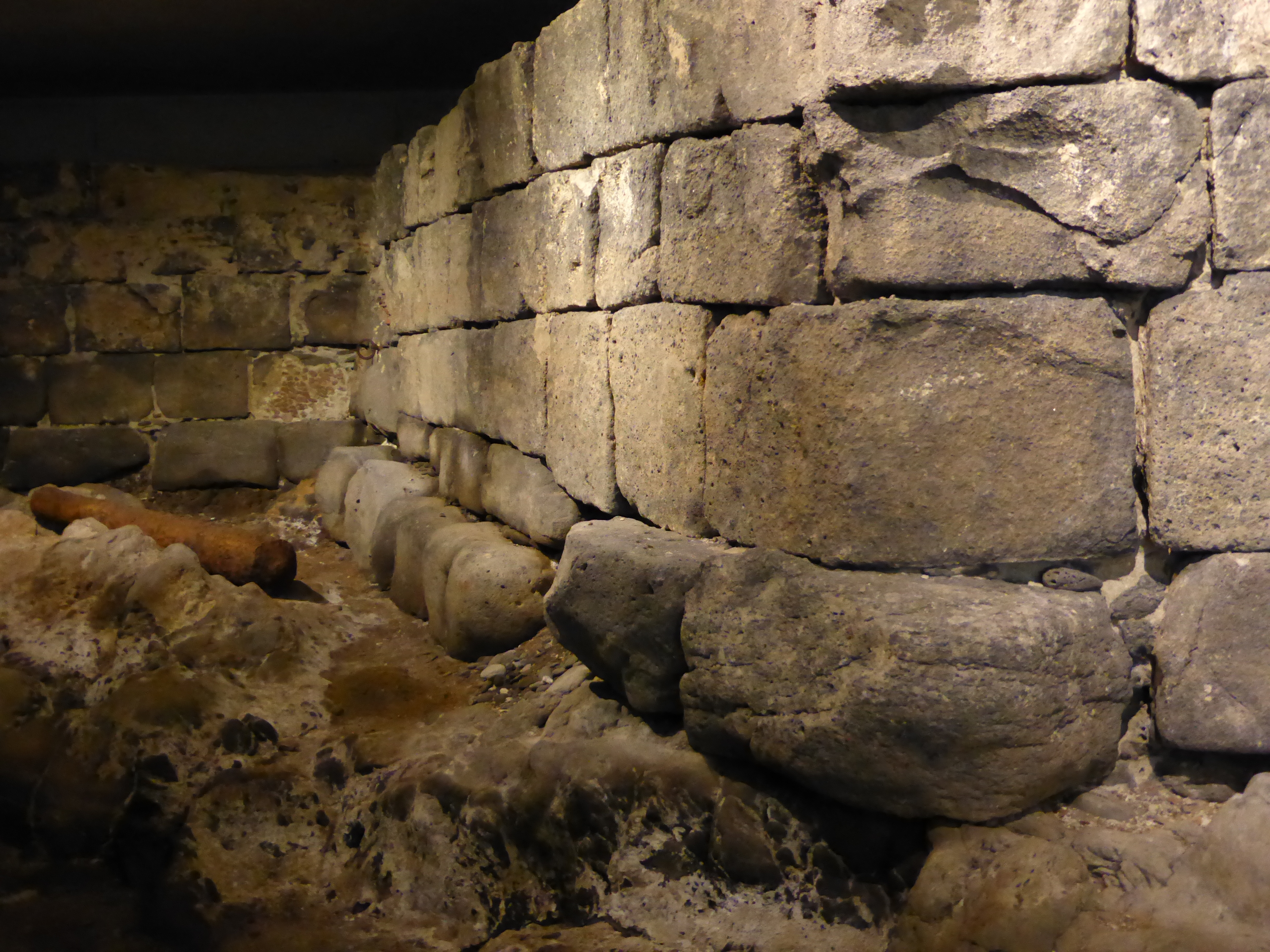 Sillares de la parte inferior de las murallas defensivas del antiguo Castillo de San Cristóbal, junto al mar. En esta parte las olas chocaban contra el muro. Estos sillares fueron colocados en 1575 o 1576 (siglo XVI). Actualmente estos restos pueden verse en un Centro de Interpretación subterráneo, de la Plaza de España.